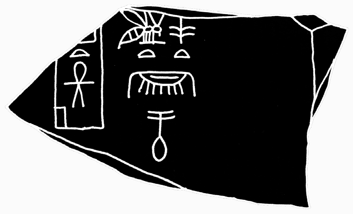 Schieferscherbe des Nubnefer